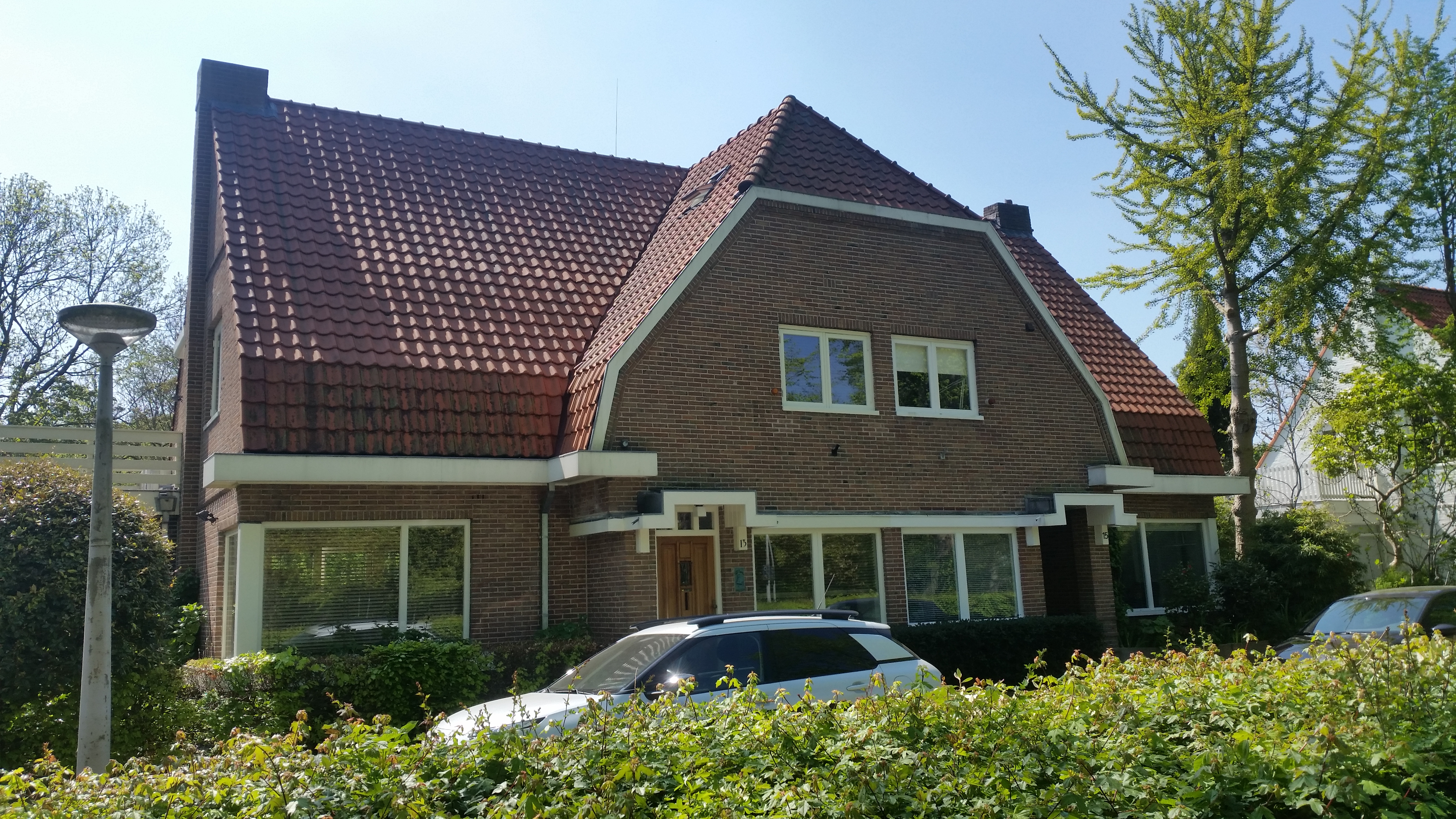 Impressie van de stadsvilla's aan de Zuidelijke Wanelweg, Amsterdam-Zuid (april 2020)